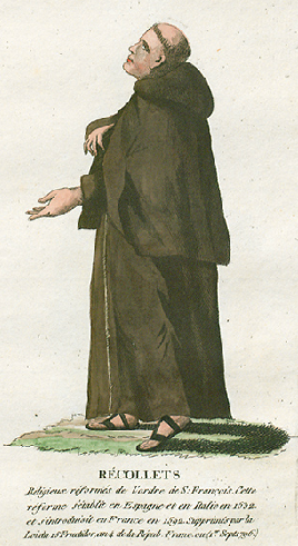 Collection de costumes de tous les ordres monastiques, supprimés à differentes époques, dans la ci-devant Belgique, Bruxelles, Philippe Joseph Maillart et sœur, 1811